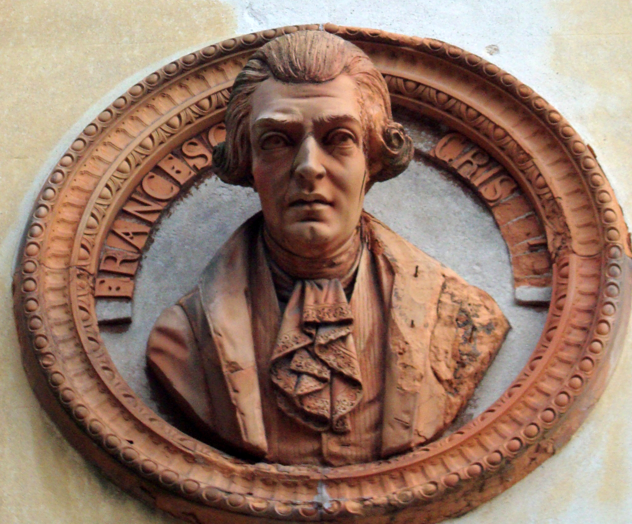 Schio, particolare della facciata del Teatro Jacquard This is a photo of a monument which is part of cultural heritage of Italy.